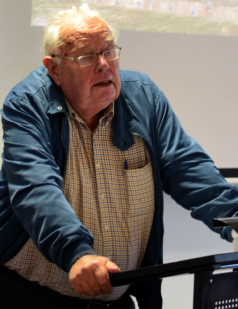 Horst Callies bei einem Vortrag zu Roms Vordringen nach Germanien im Zusammenhang mit dem römisches Marschlager von Wilkenburg